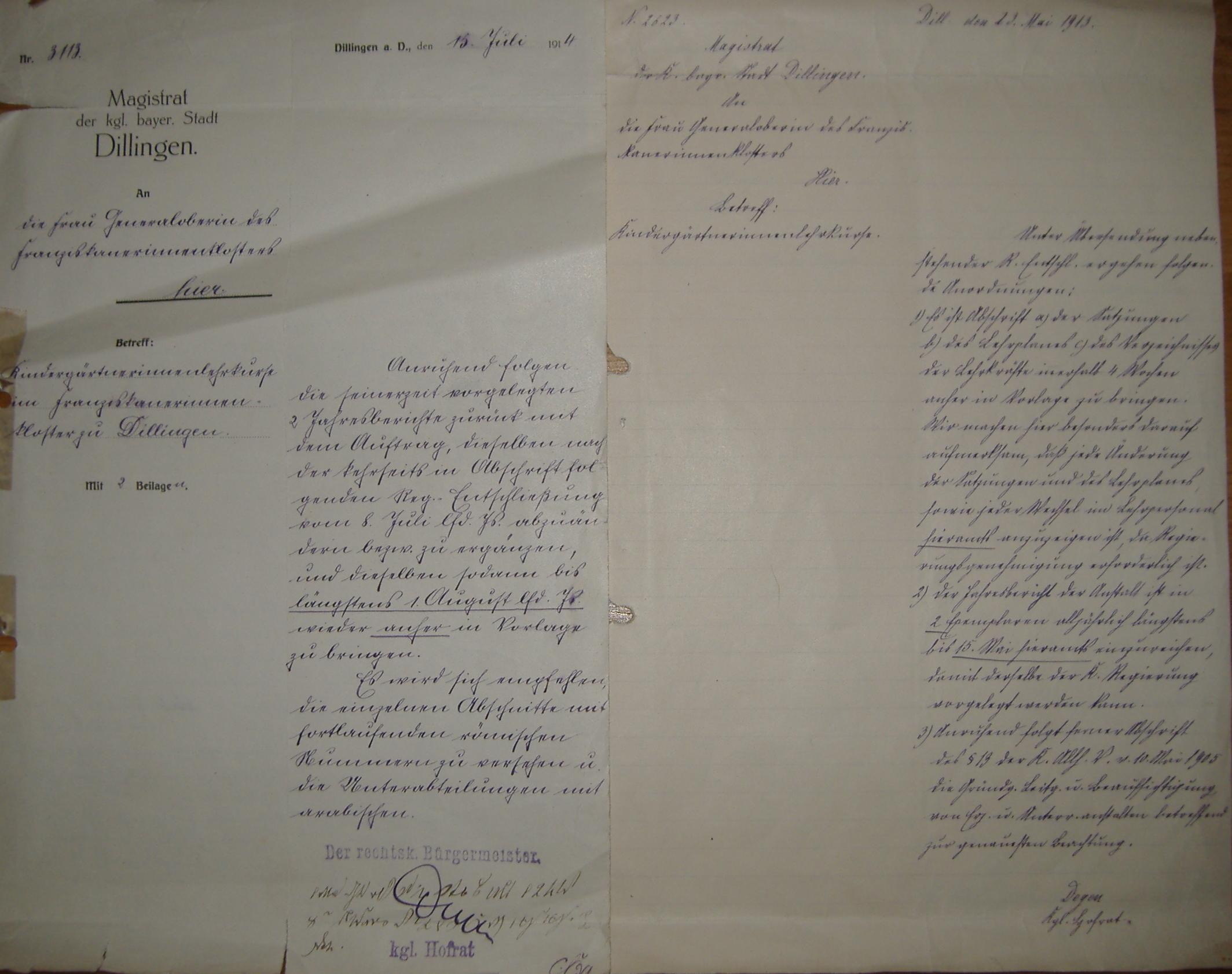 Urkunden für Unterrichtsgenehmigung 1913